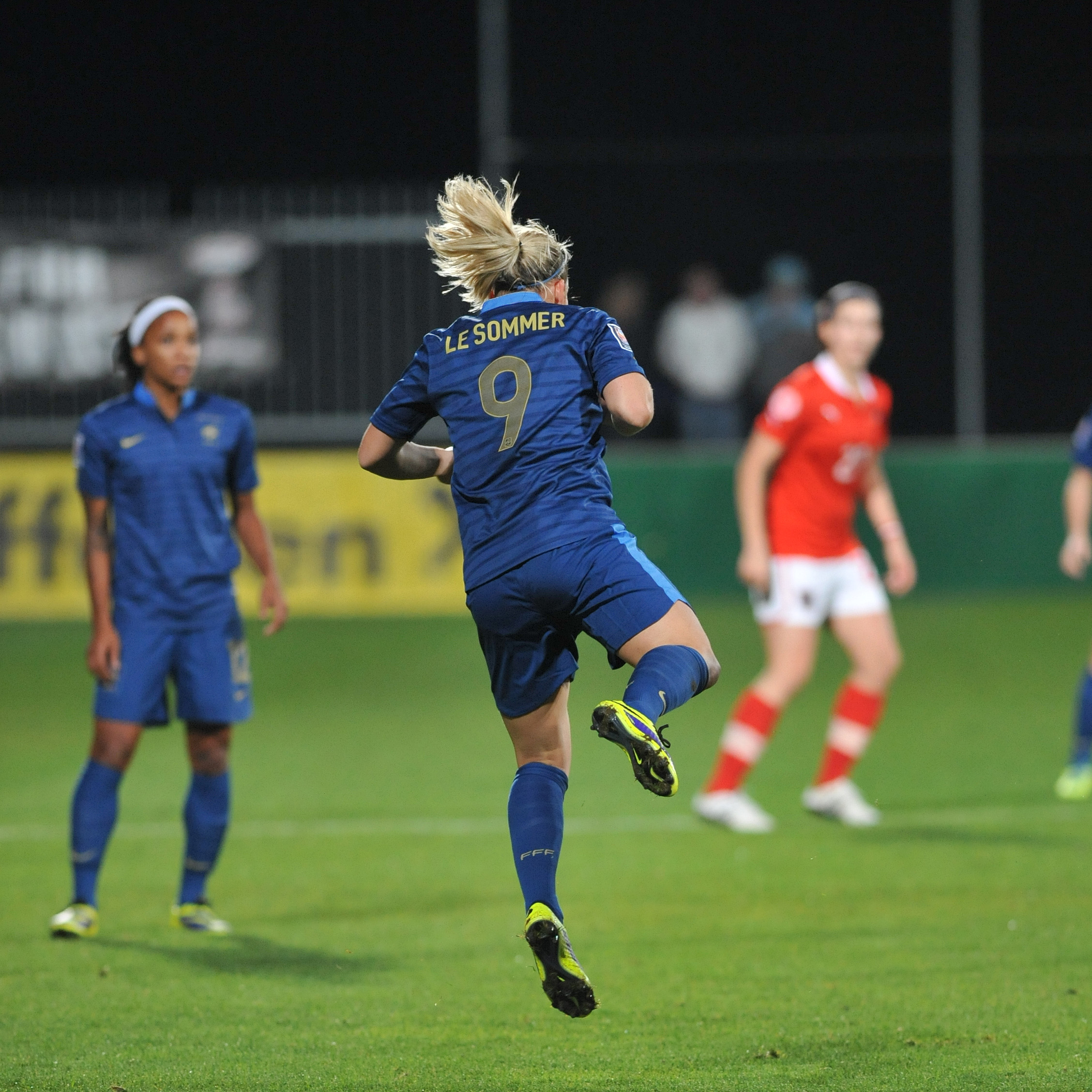 FIFA Women's World Cup 2015 Qualiying Round Österreich - Frankreich am 31. Oktober 2013 in Ritzing: Eugénie Le Sommer